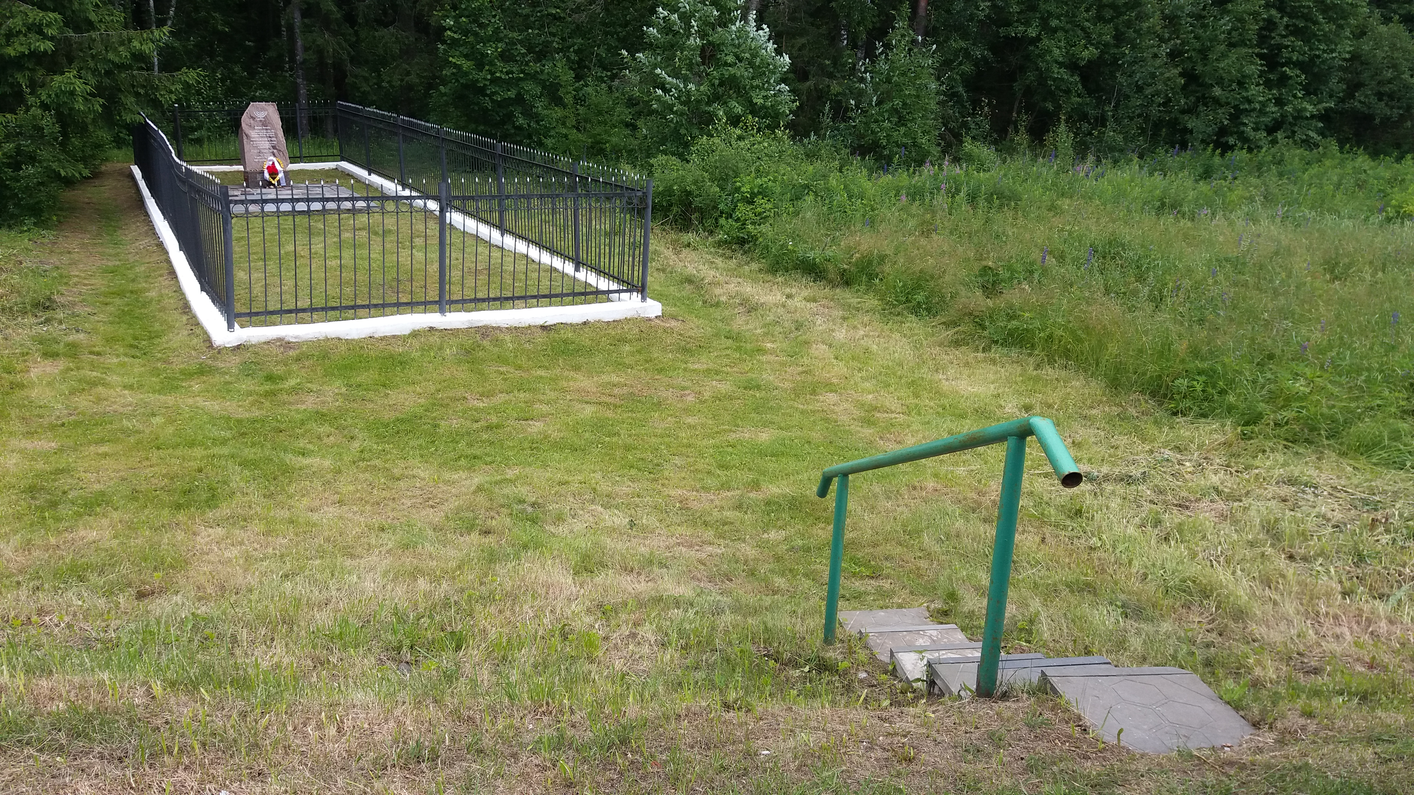 Памятник 961 убитым нацистами евреям деревни Бобр Крупского района 10 октября 1941 года. Сама братская могила с останками убитых находится справа от памятника вглубь леса. Первоначальный памятник из бетона был установлен на этом месте в 1959 году. Государственное воинское захоронение – номер знака 5213. Находится справа у дороги Р62 между деревнями Бобр и Замки в направлении на Лукомль.